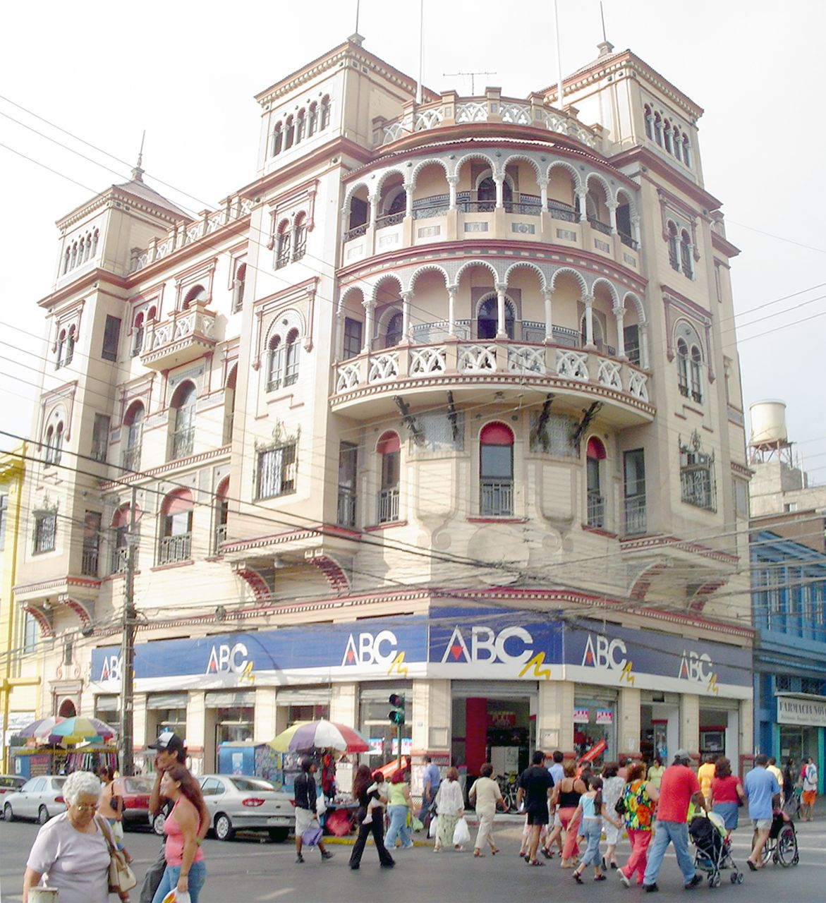 Casa Giménez. Antofagasta, Chile. Source: [1] Date: 08/02/2006 Author: Marcos Escalier